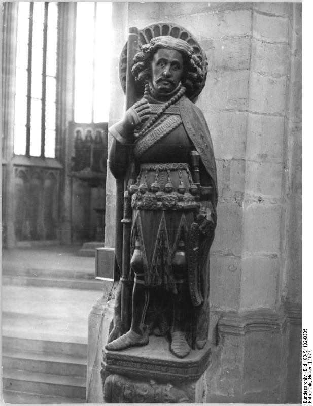 Halle, Moritzkirche, Statue des Hl. Moritz ADN-ZB Link St. Moritz-Statue in der Moritzkirche in Halle.